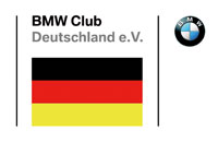 Clublogo des BMW Club Deutschland e.V.